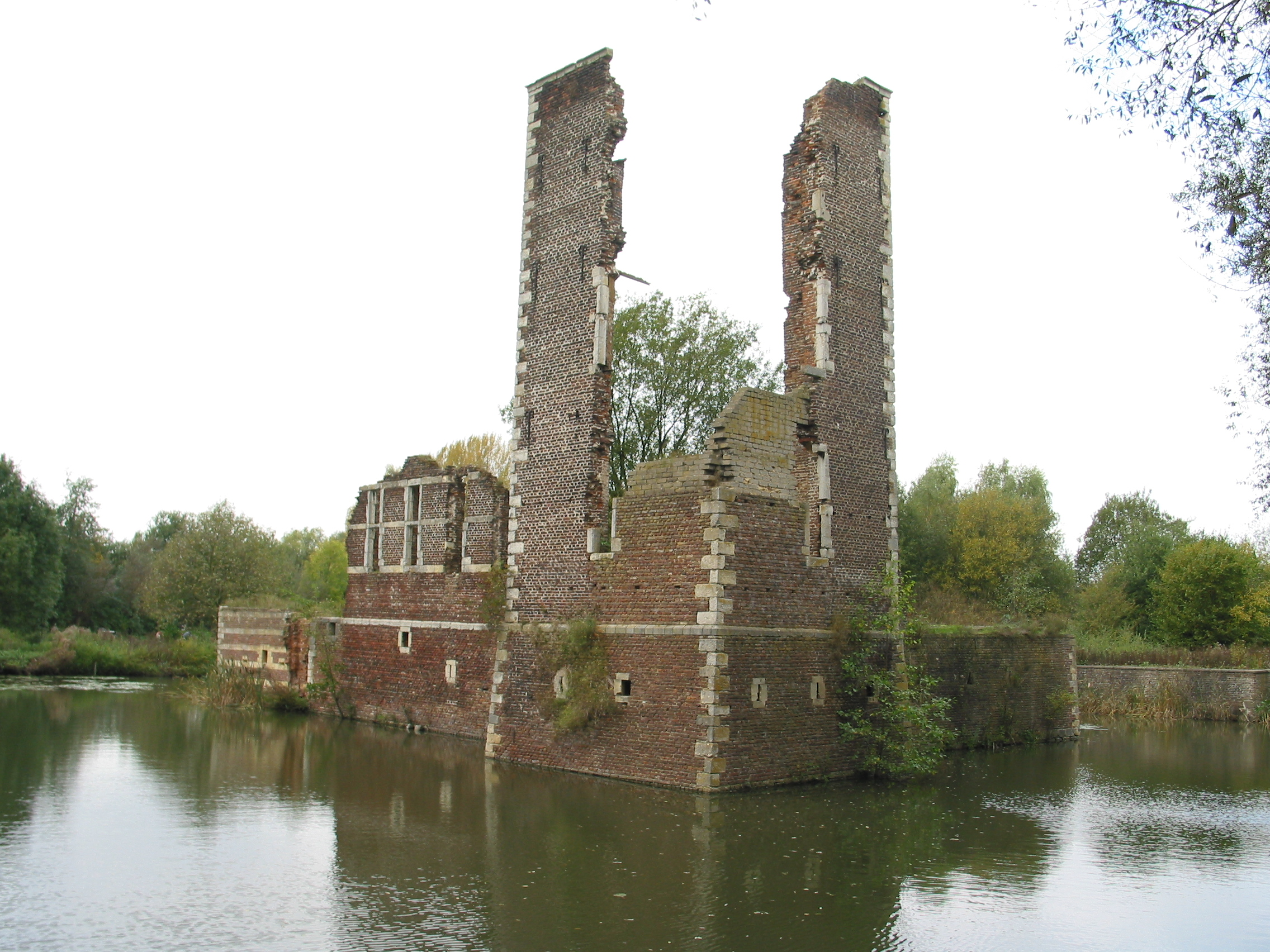 Het hoekgebouw van de ruïne van kasteel Schaesberg